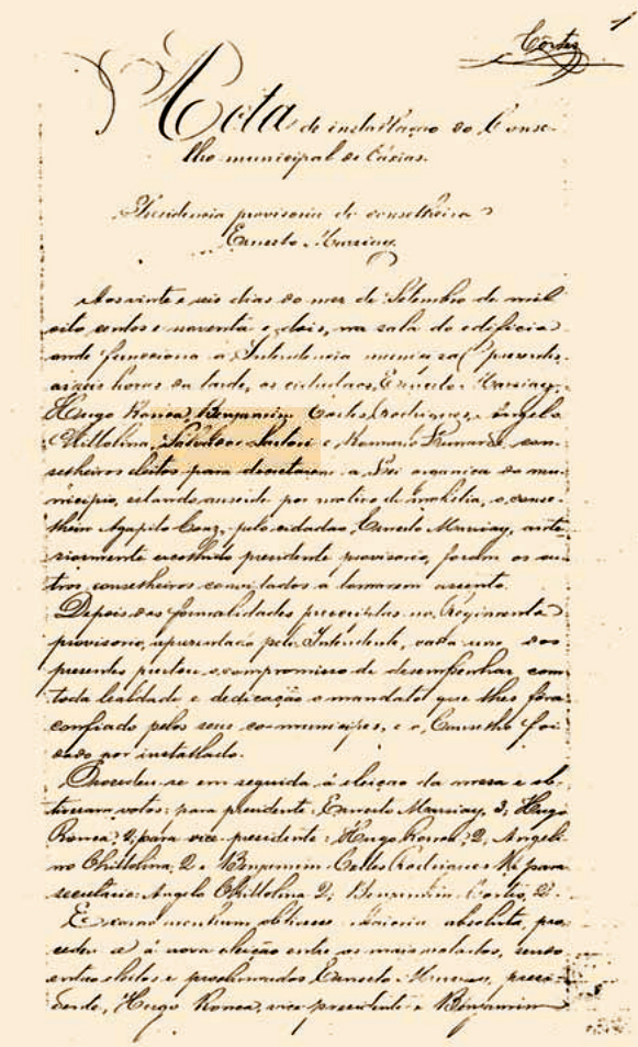 Ata de instalação do primeiro Conselho Municipal de Caxias do Sul